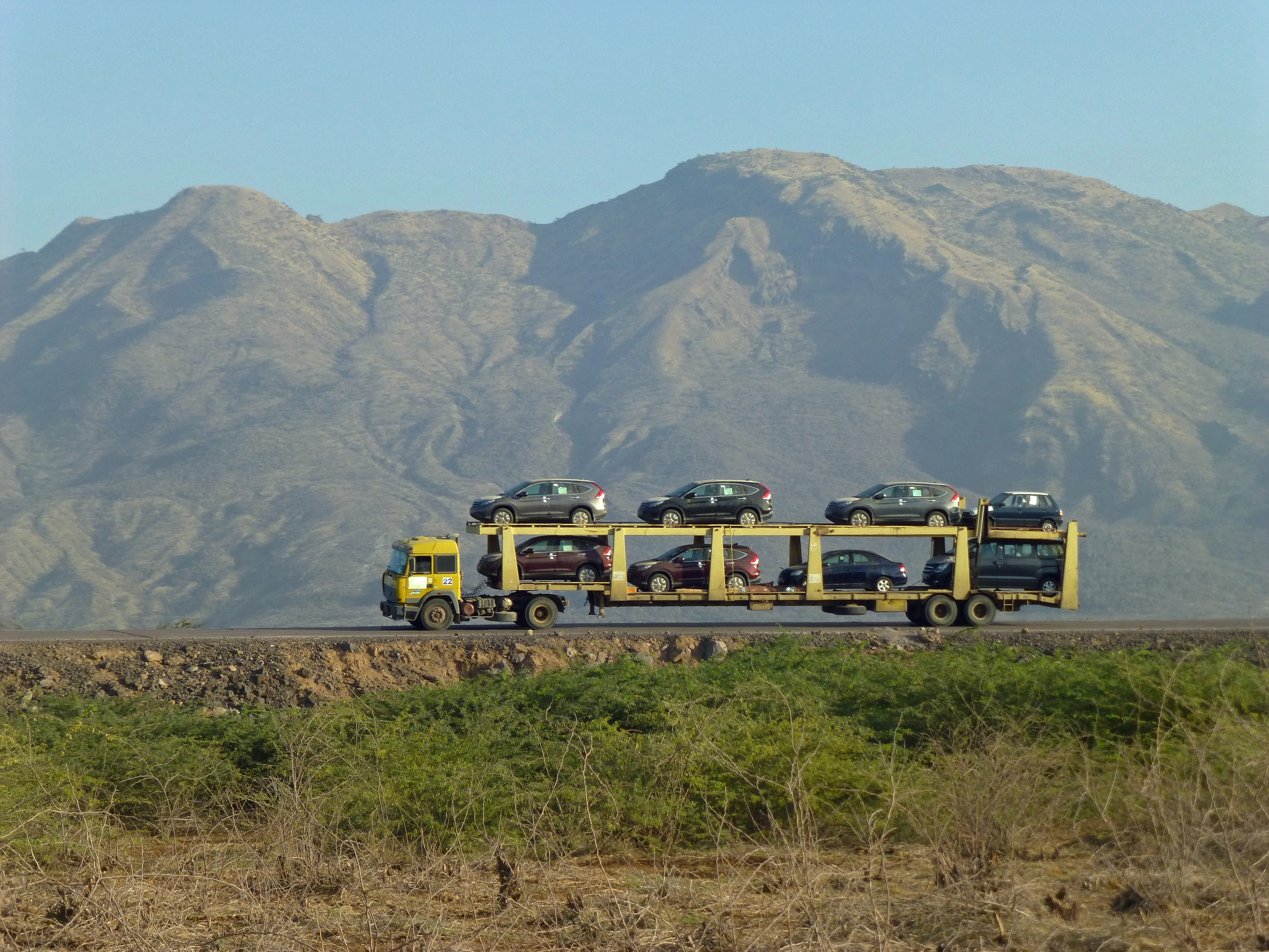 Ethiopie (région Oromia) : route nationale 4 au lac Basaka